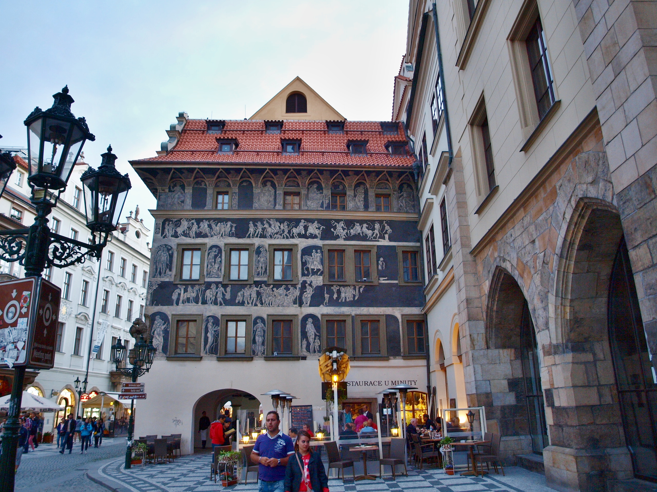 Dům U Minuty